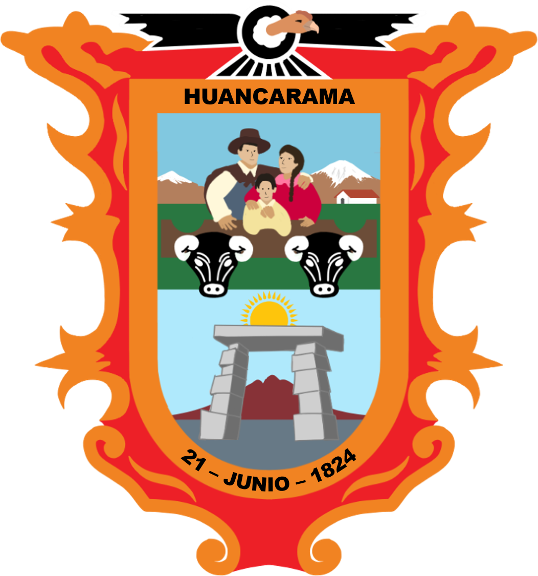 Huancarama, Andahuaylas, Apurímac